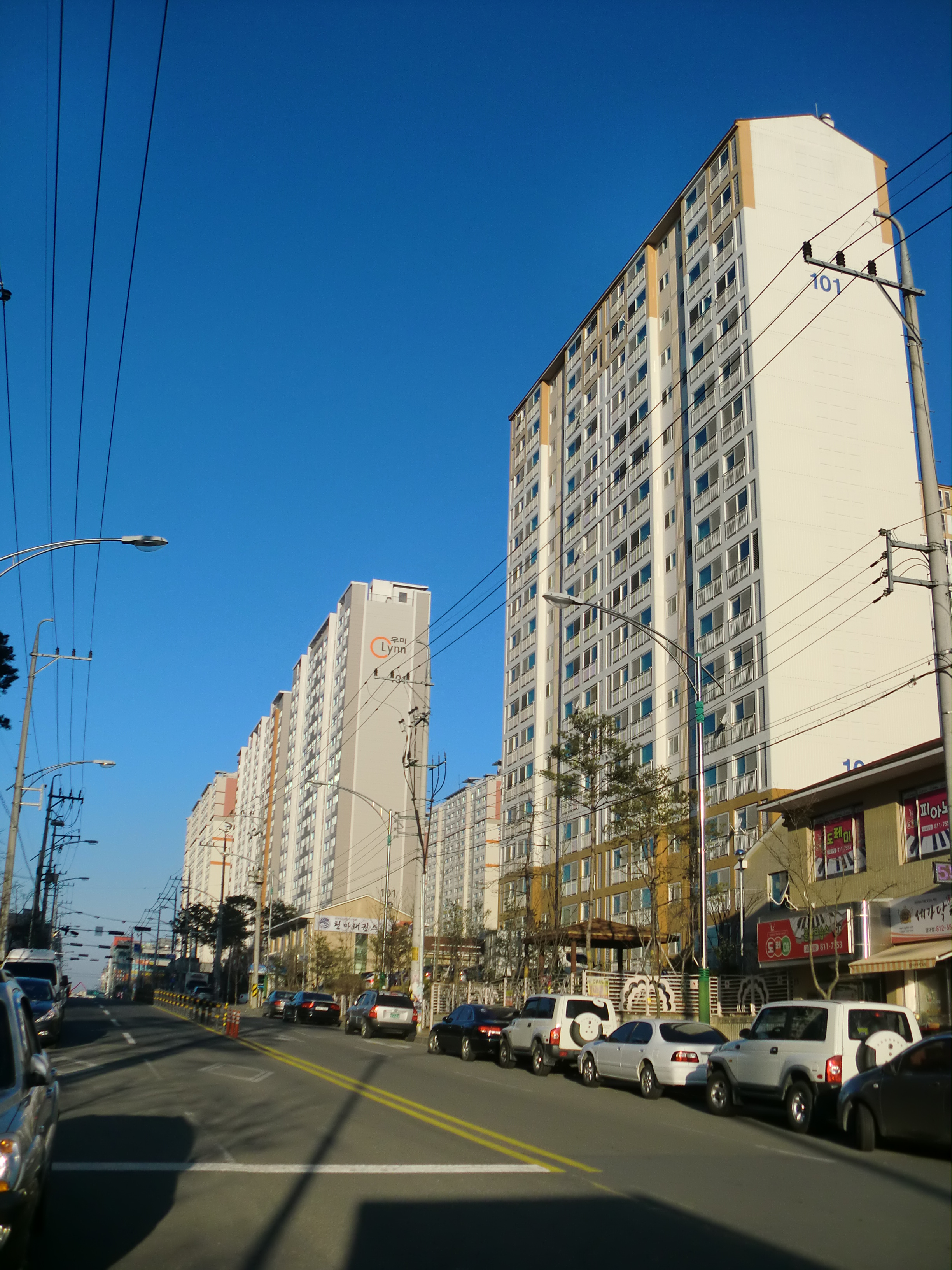 경상북도 경산시 압량면 경산소방서근처의 아파트